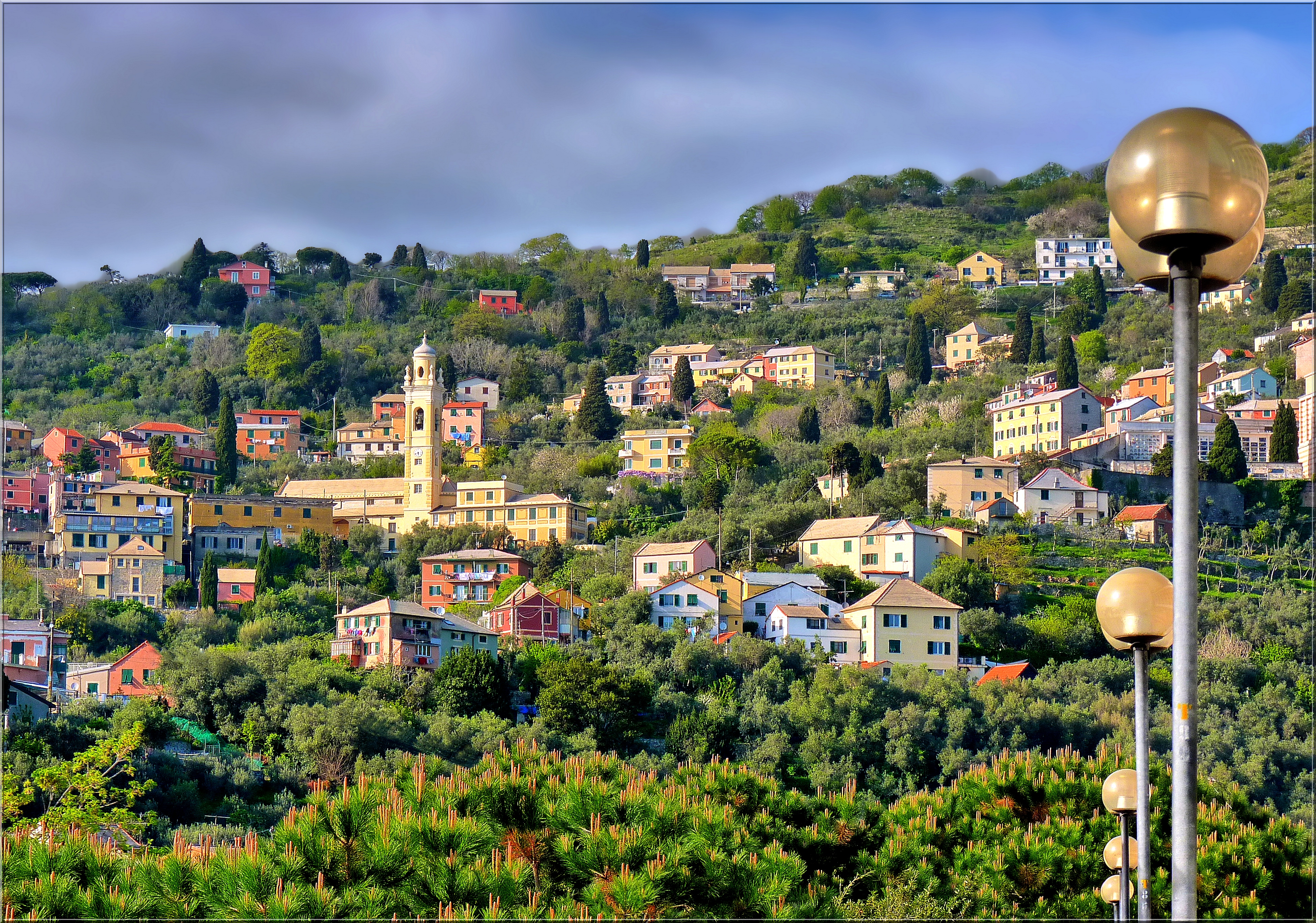 Genova, panoramica del quartiere di Apparizione